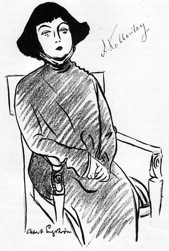 Alexandra Kollontai, Aleksandra Kollontaj, Алекса́ндра Миха́йловна Коллонта́й